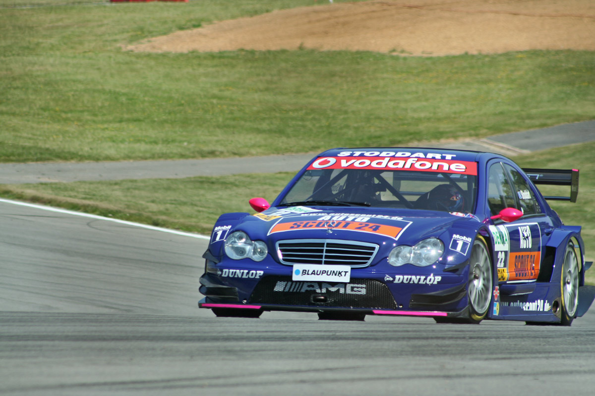 Susie Stoddart driving for Mercedes-Benz in the 2006 Deutsche Tourenwagen Masters season.